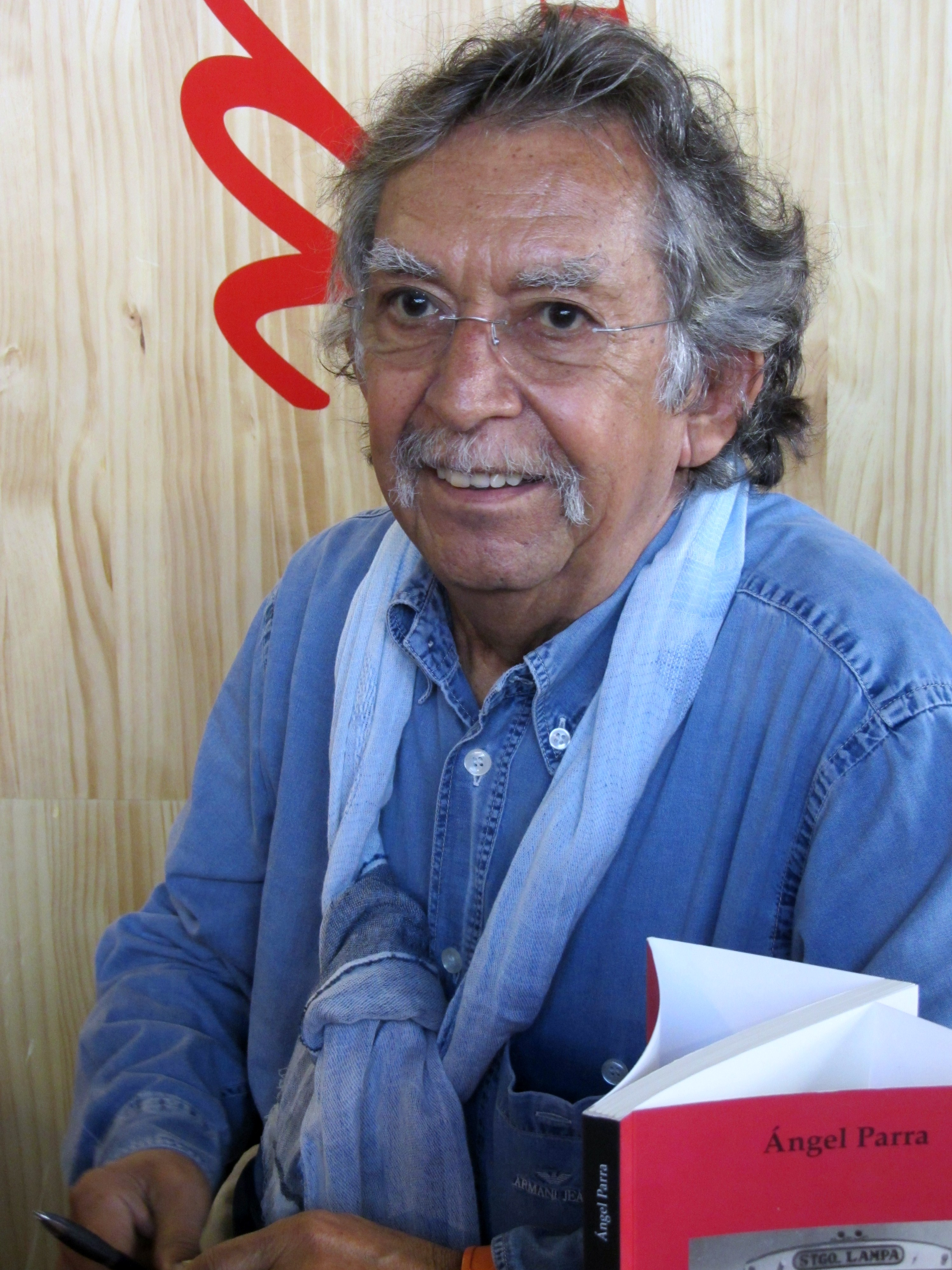 El cantautor chileno Ángel Parra en la Feria Internacional del Libro de Santiago 2015